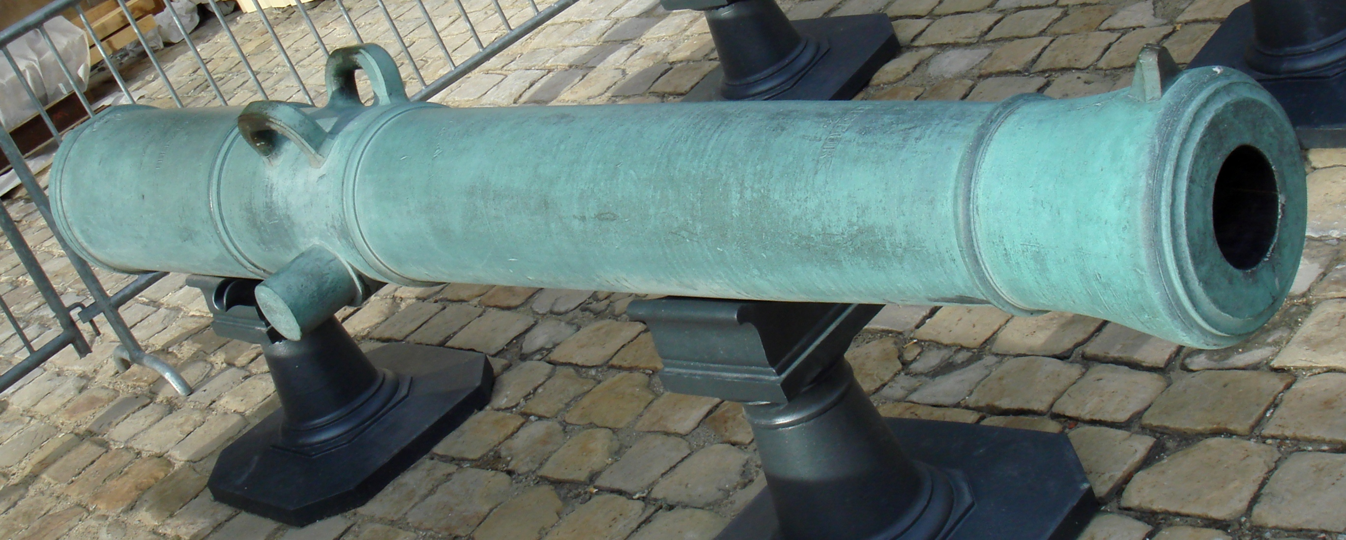 Canon_de_16_Gribeauval_An_3_de_la_Republique_1794_1795_side_view